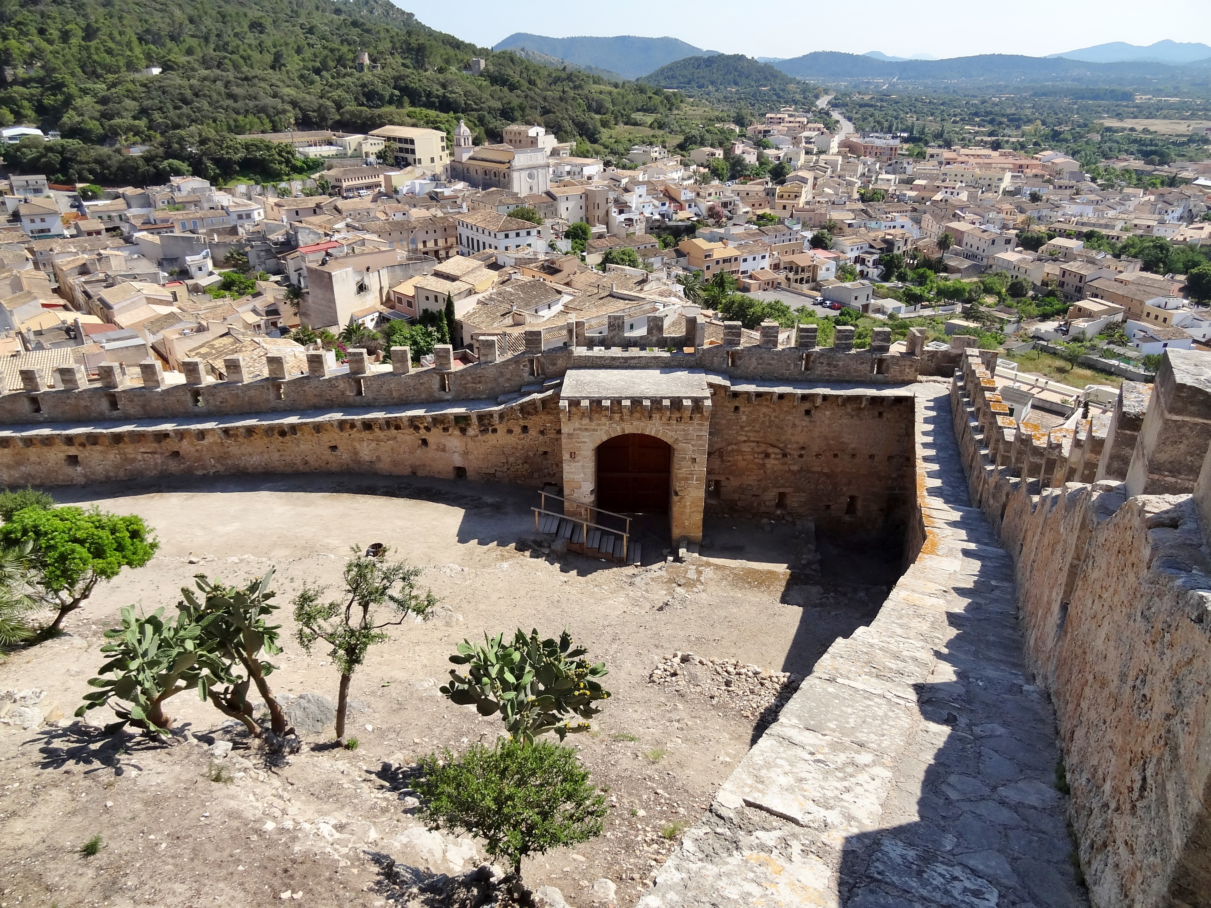 Castell de Capdepera, Gemeinde Capdepera, Mallorca, Spanien